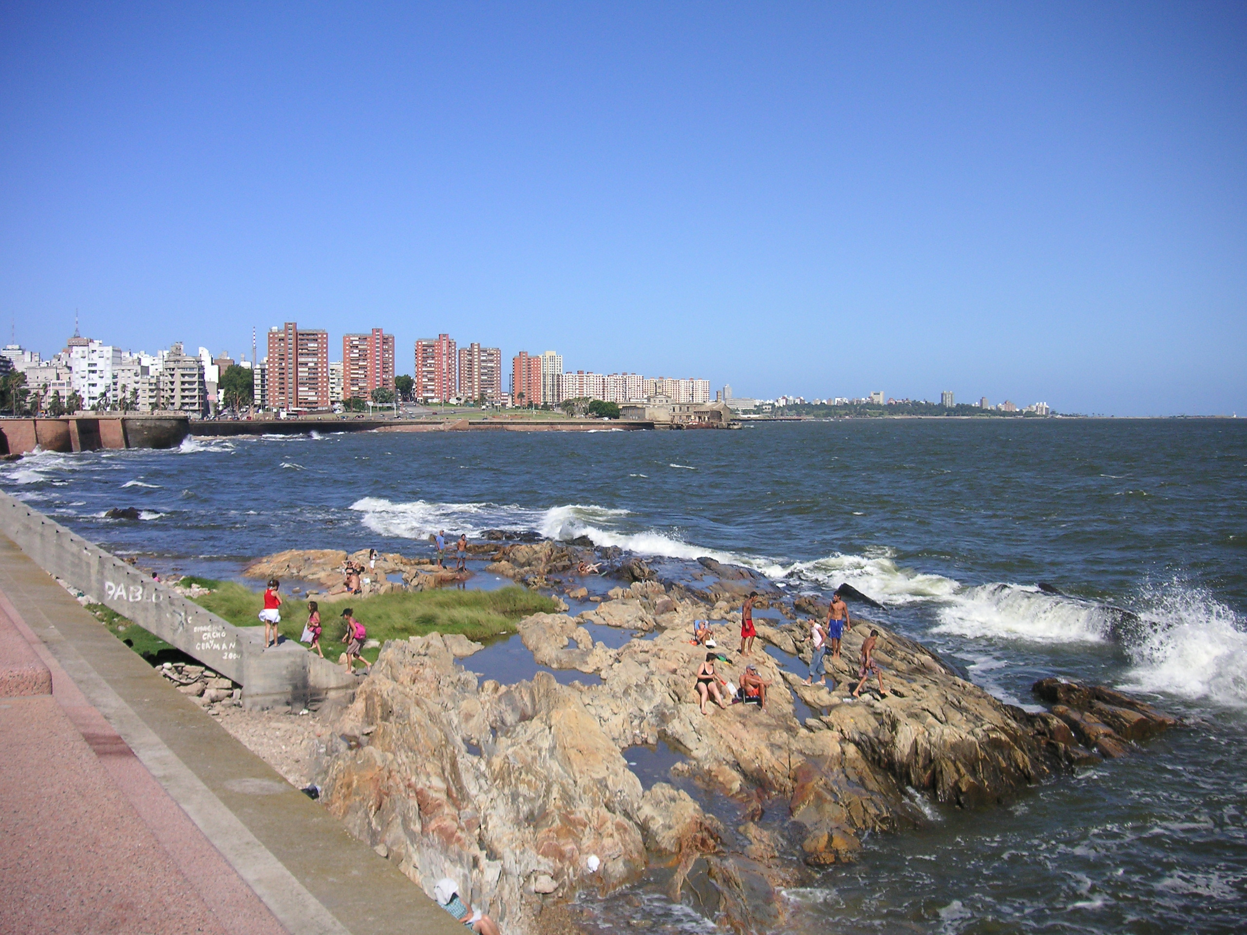 Costa de Montevideo, zona portuaria.